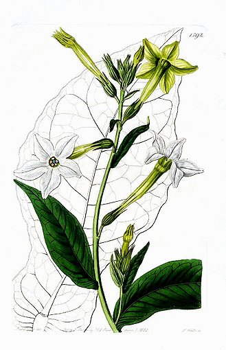 Shiraz Tobacco, Nicotiana alata var. persica (Syn. Nicotiana persica)